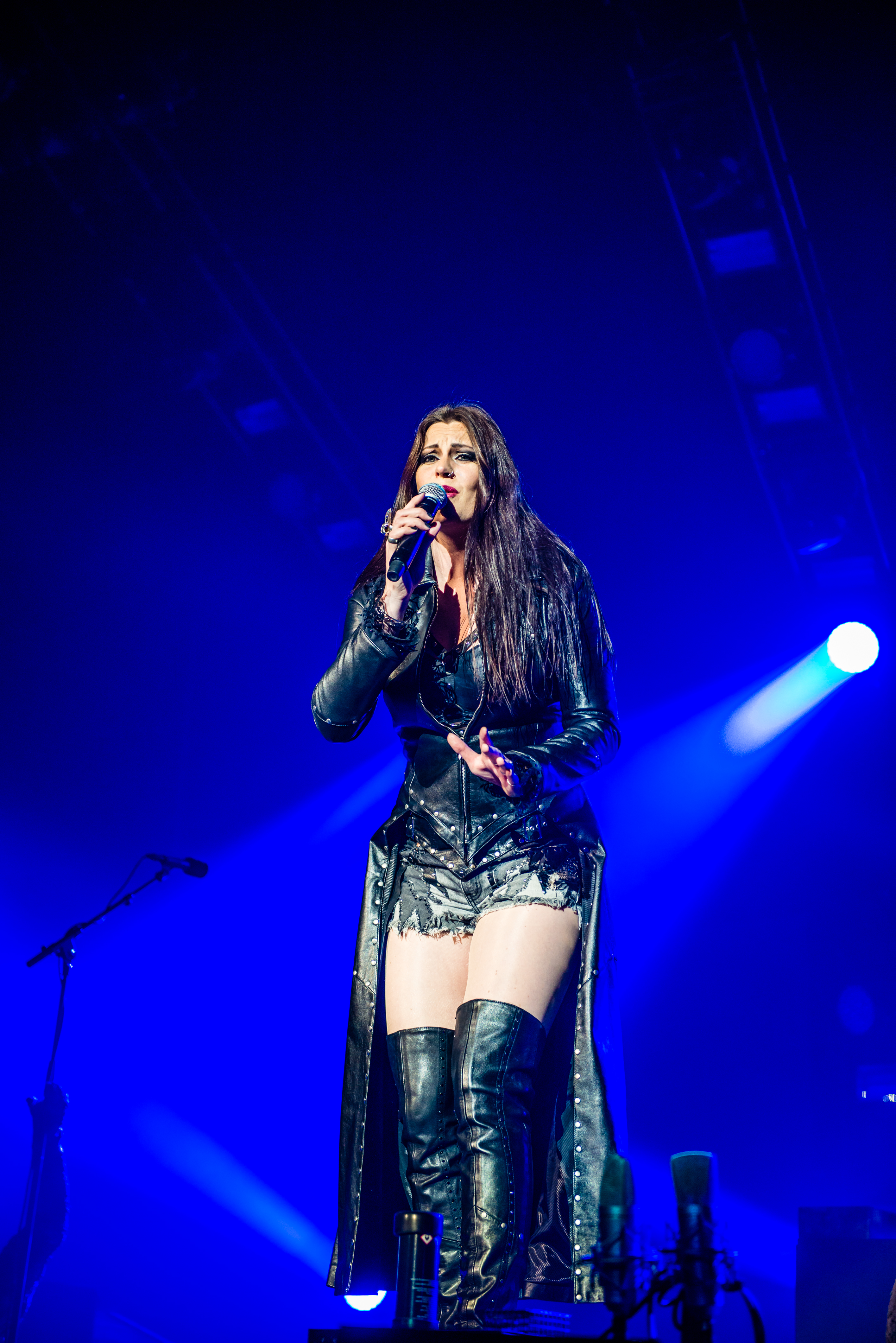 'Nightwish Endless forms most beautiful Tour 2015 Oberhausen'